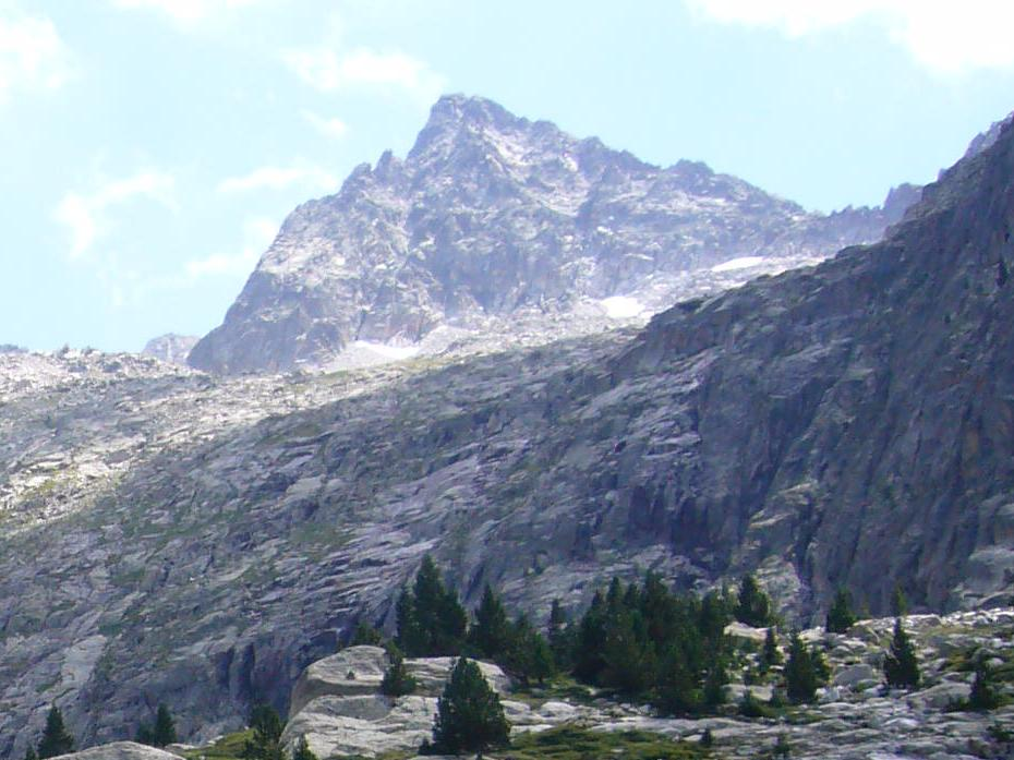 Pic d'Abeller vist des de la Vall de Besiberri; Vilaller, Alta Ribagorça, Catalunya